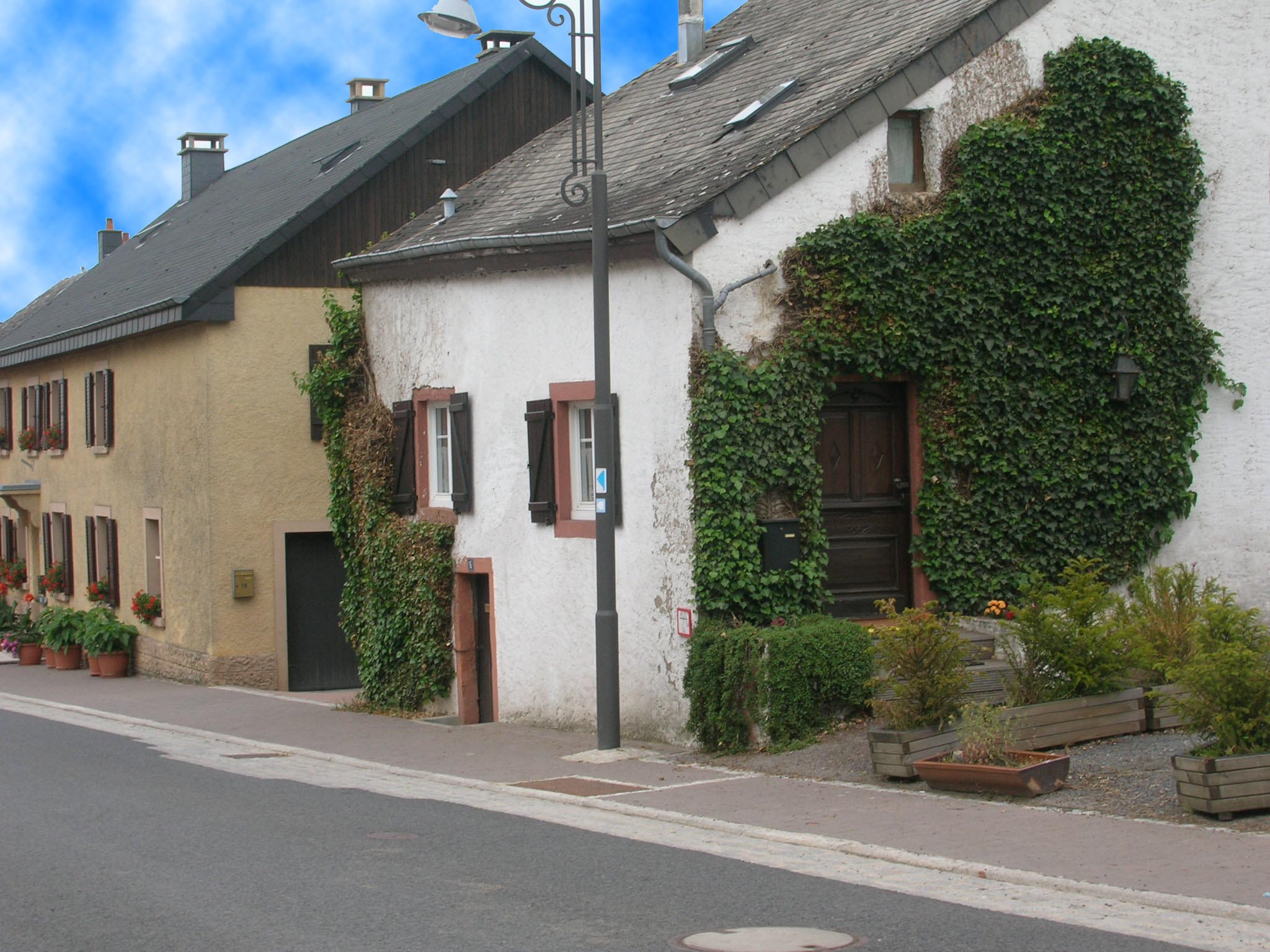 Eschduerf: Al Haiser